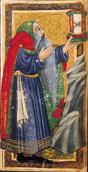 Charles VI (or Gringonneur) Deck; Le tarot dit de Charles VI